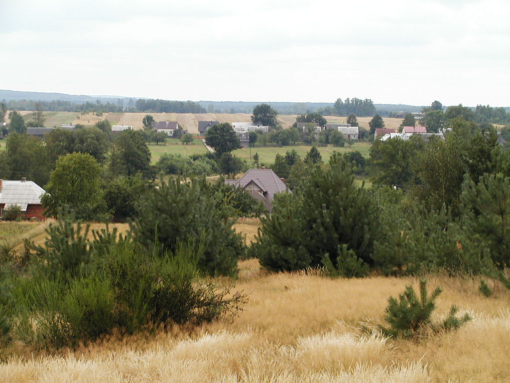 Starzechowice widziane z pobliskiego wzniesienia Author: Marcin.sobczyk (pl.wiki)